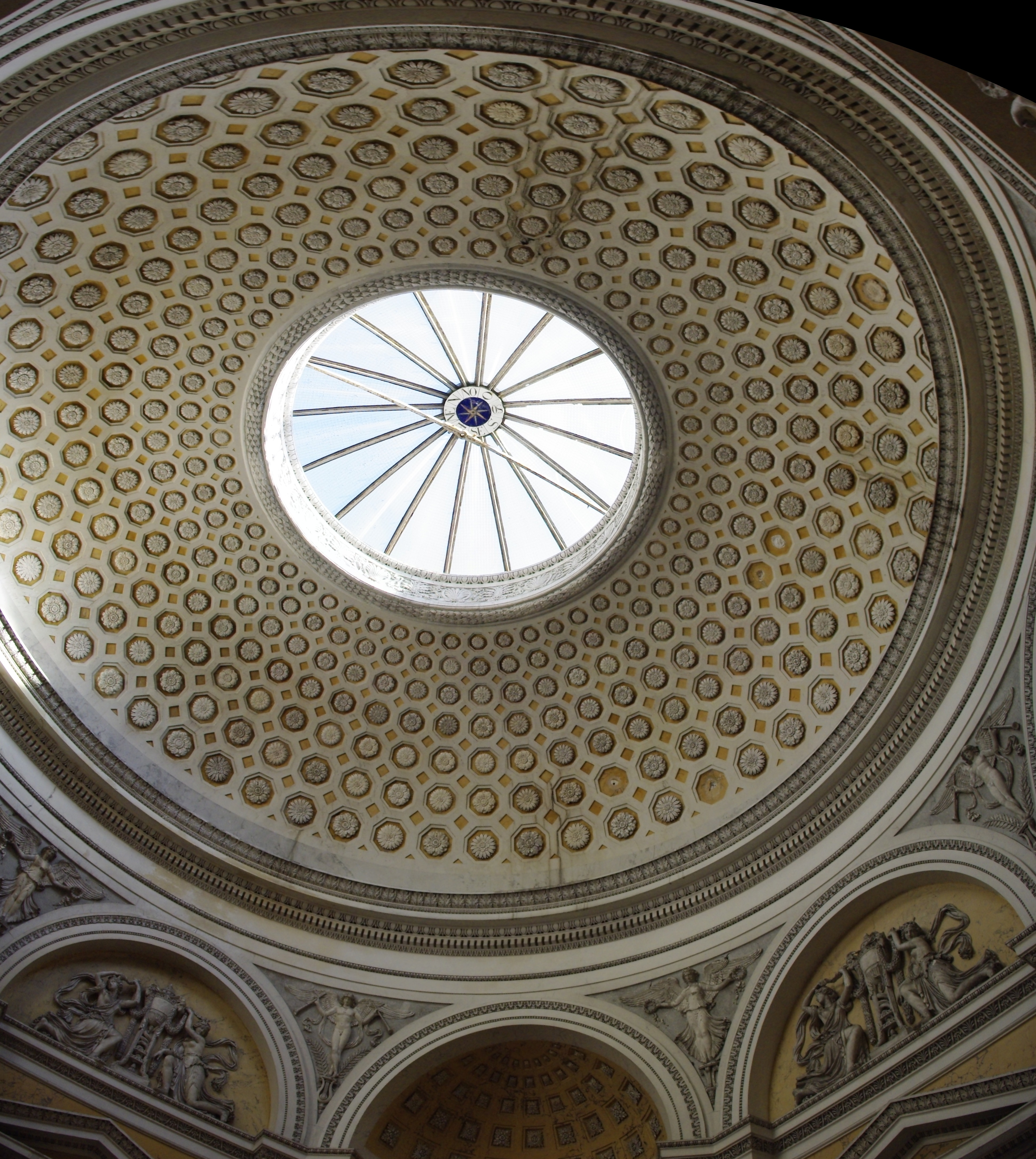 Neuilly-sur-Seine - Cabinet de curiosités construit au XVIIIe siècle dans le parc de la Folie Saint-James (rue du Général-Henrion-Bertier)